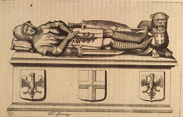 Tomáš I. Savojský